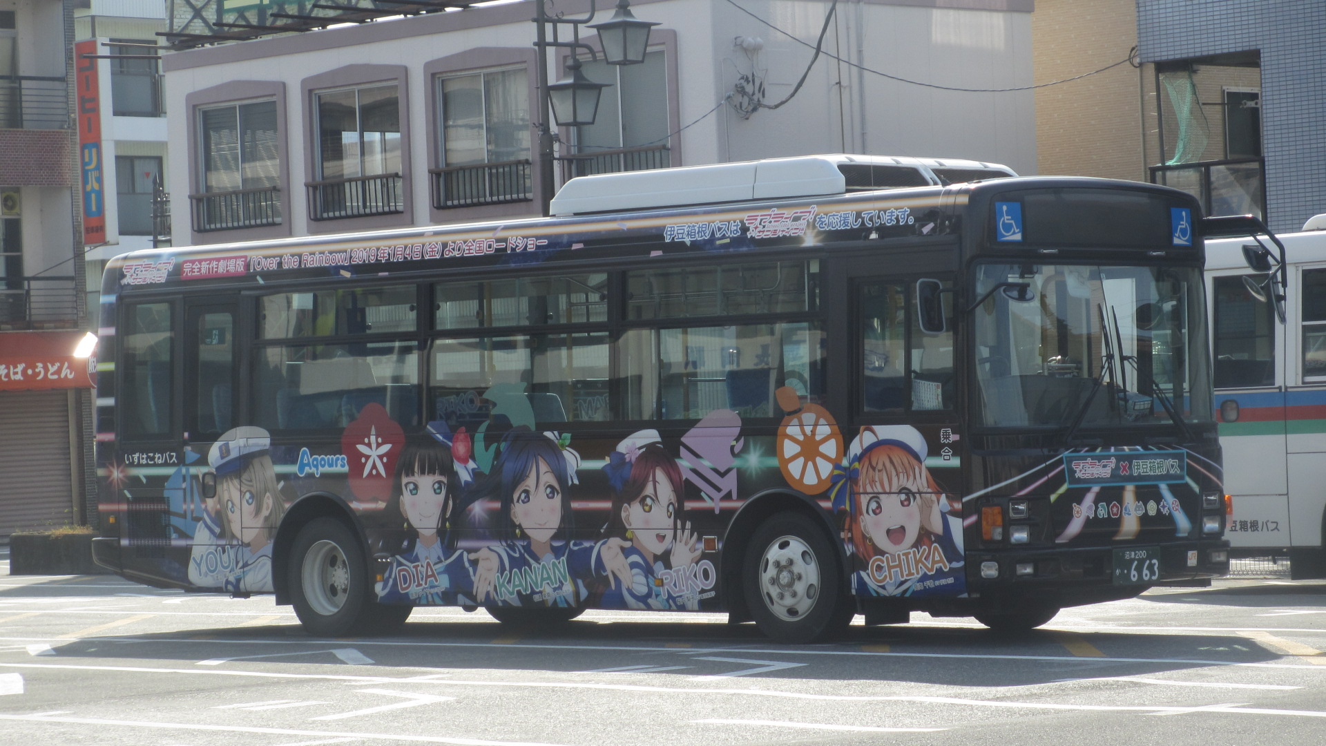 伊豆箱根バス 三島営業所 所属 沼津200か・663